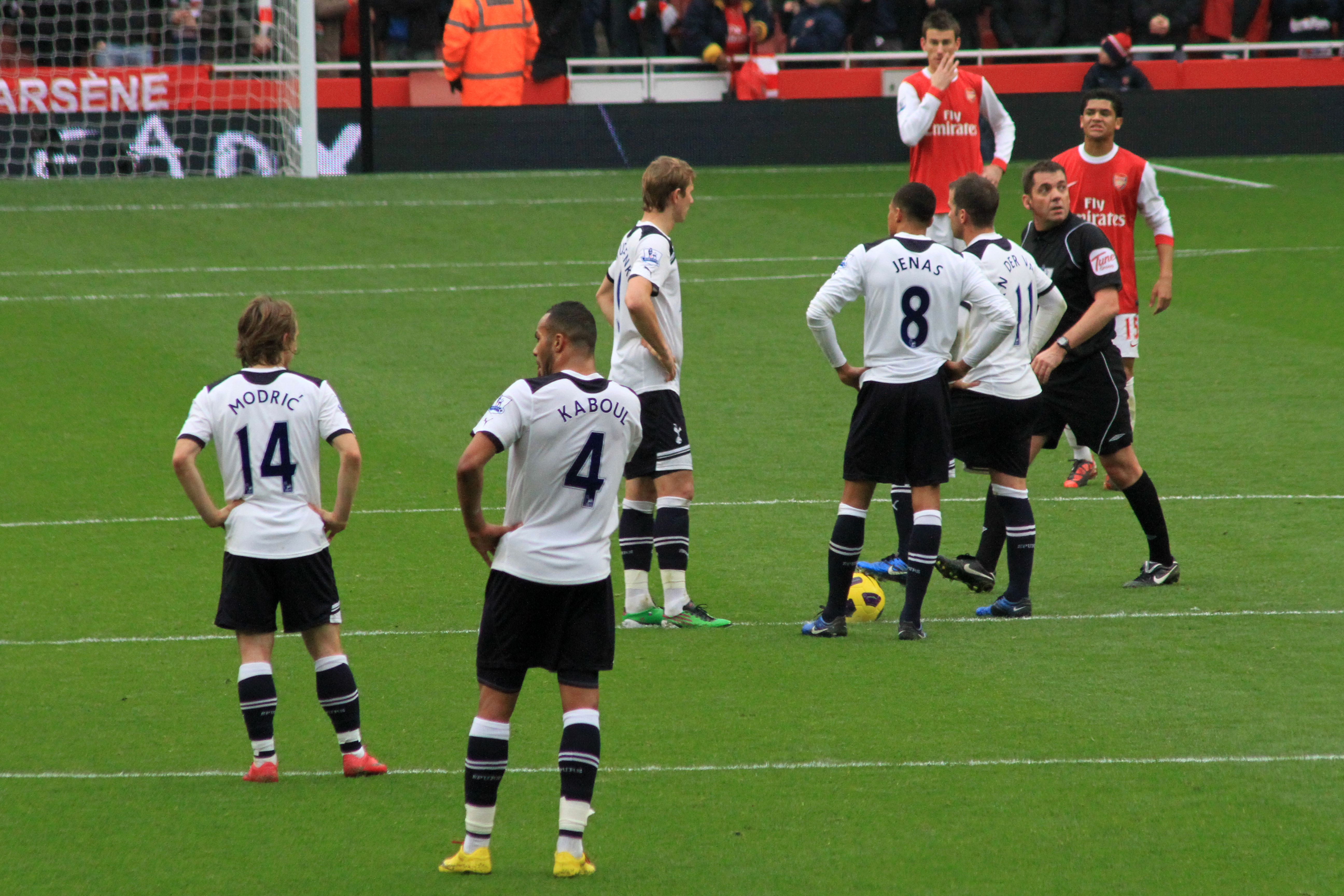 Kick Off